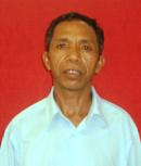 Gabriel Ximenes, Abgeordneter des Nationalparlaments Osttimors